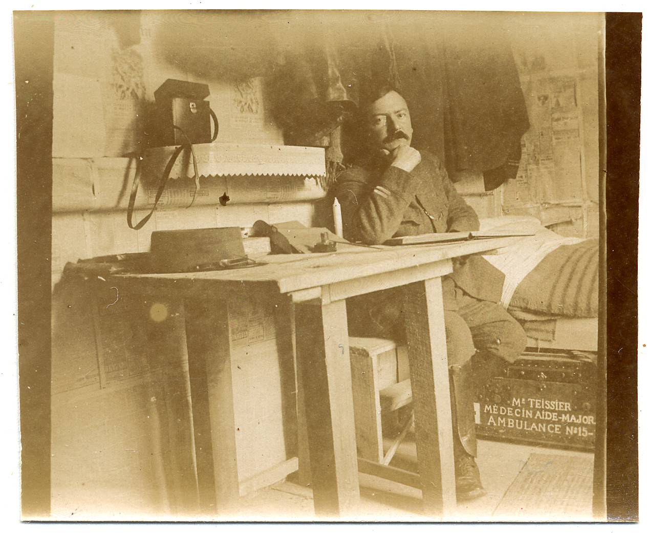 Vue du médecin aide-major de l'Ambulance N°15 Teissier assis sur son lit dans sa chambre à Cuperly (Marne). Entre 1914 et 1918. Guerre 1914-1918.